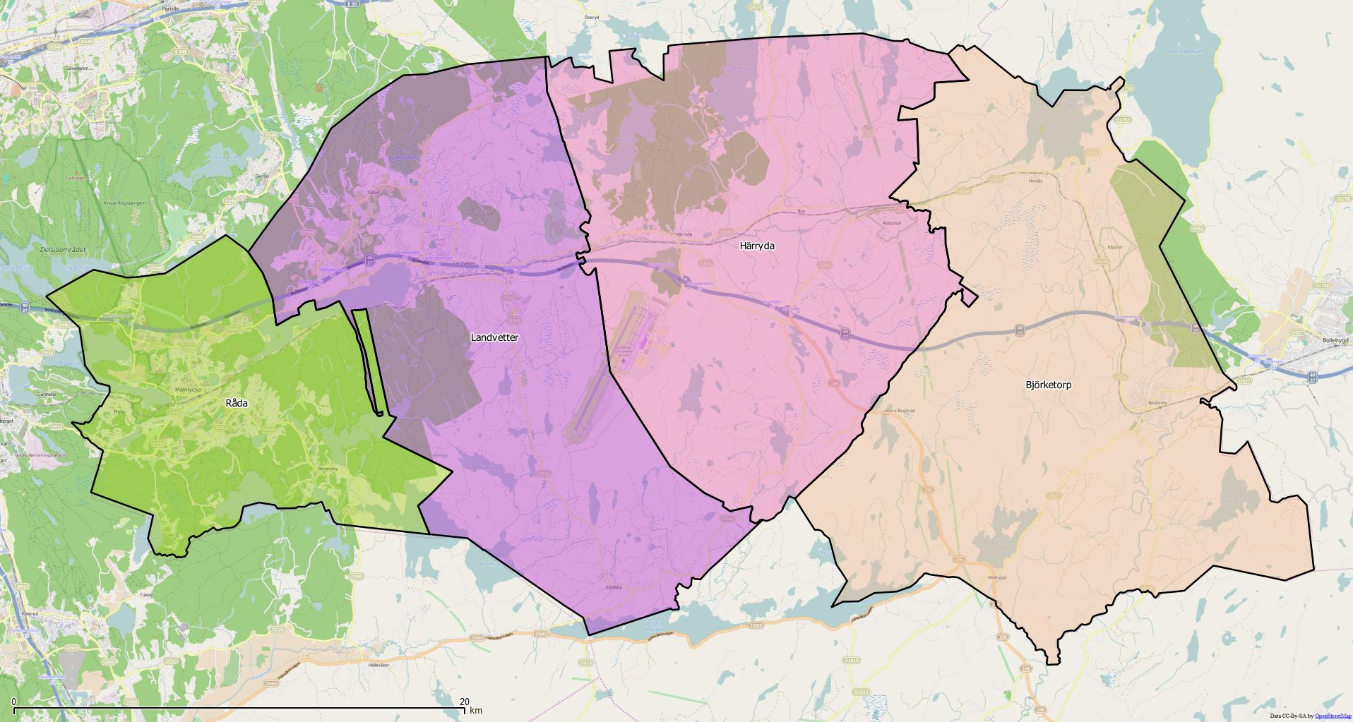 Distriktsindelningen i Härryda kommun World file: 31.3225995470202534 0 0 -31.3225995470202534 1340146.61160529800690711 7913148.45762686617672443